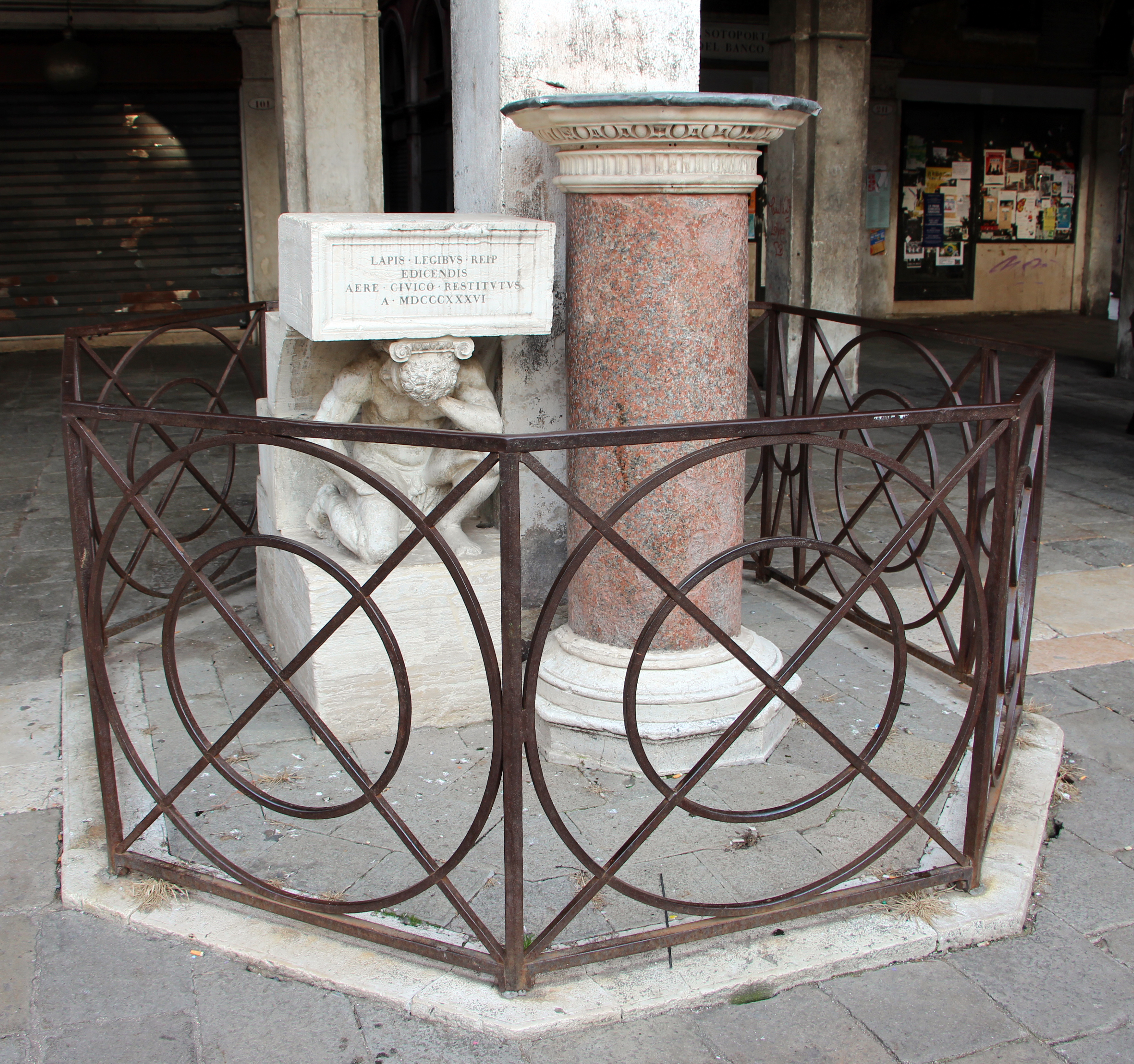 Venezia, miscellanea